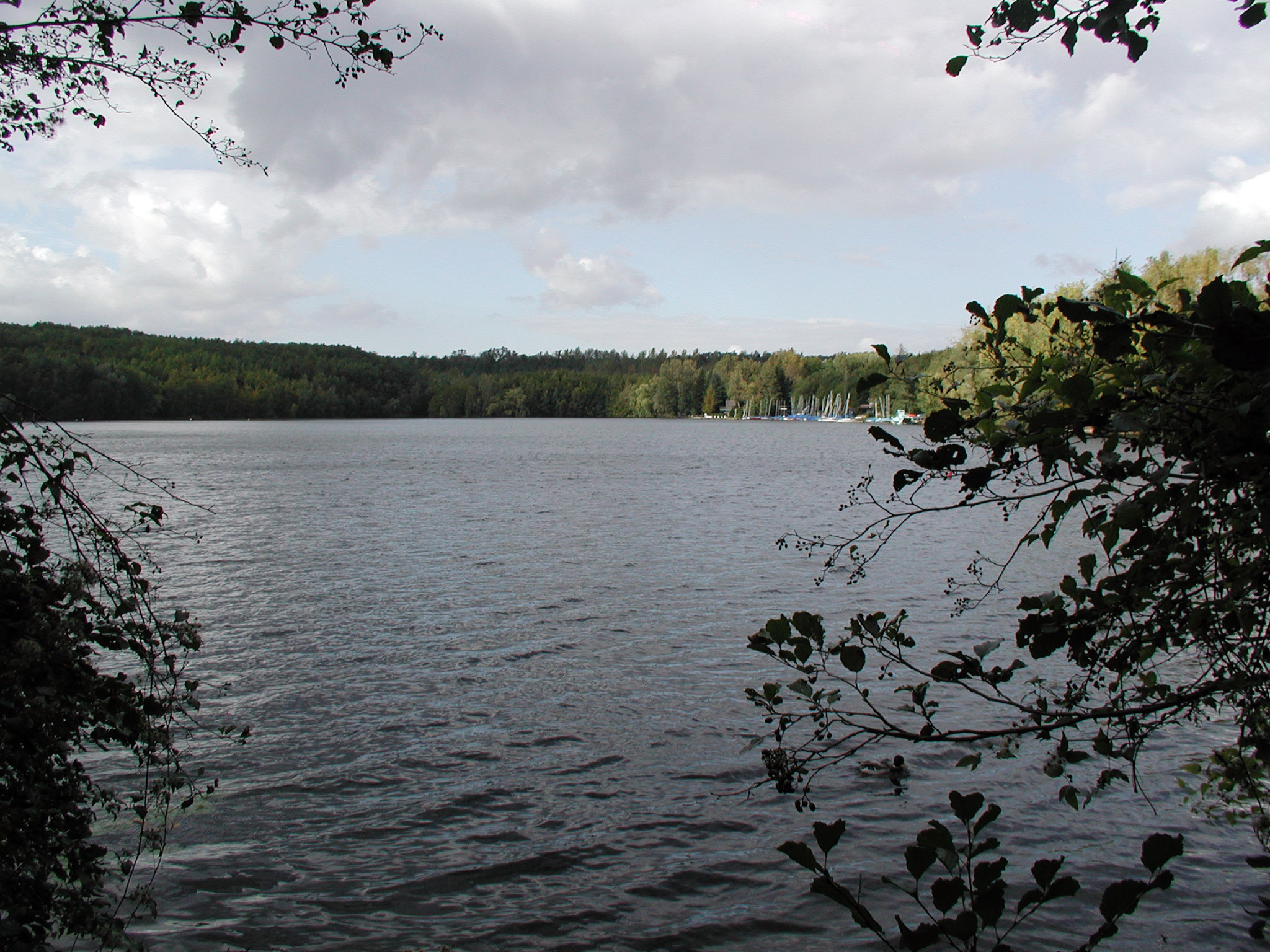 Heider Bergsee, Brühl/Rheinl.